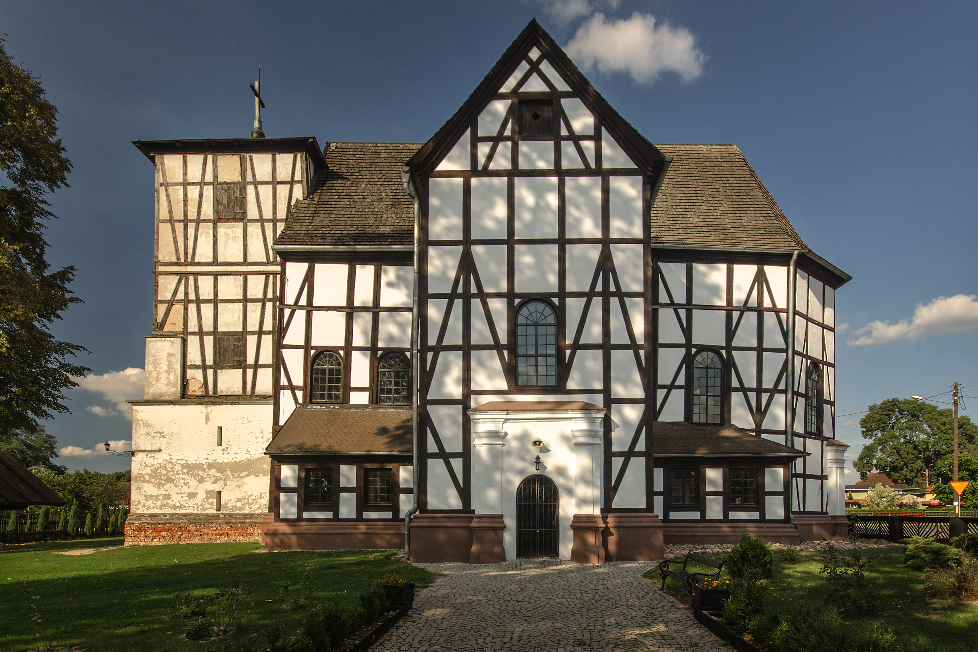 Wierzbica Górna, kościół ewangelicki, ob. rzym.-kat. fil. p.w. św. Jacka, 1719-1722